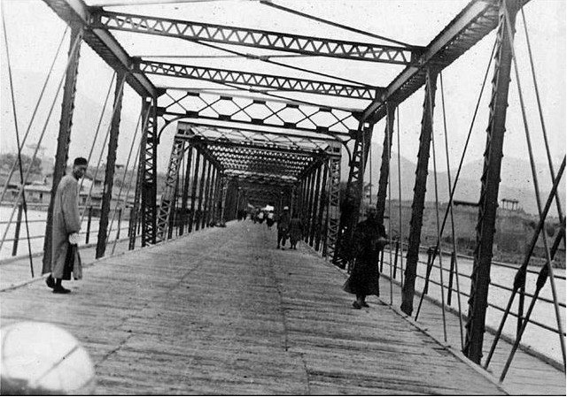 1933年时的兰州中山桥桥面